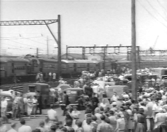 Sydenham Rail Disaster 1953